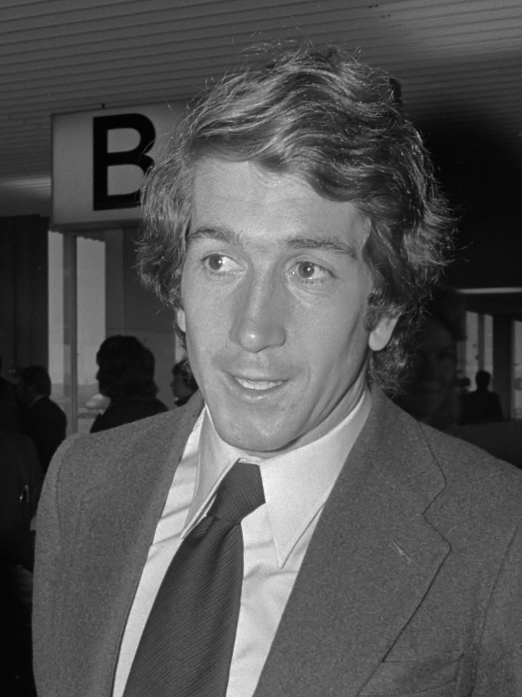 Aankomst elftal Real Madrid op Schiphol, Amancio (links) en Velazquez 8 april 1973